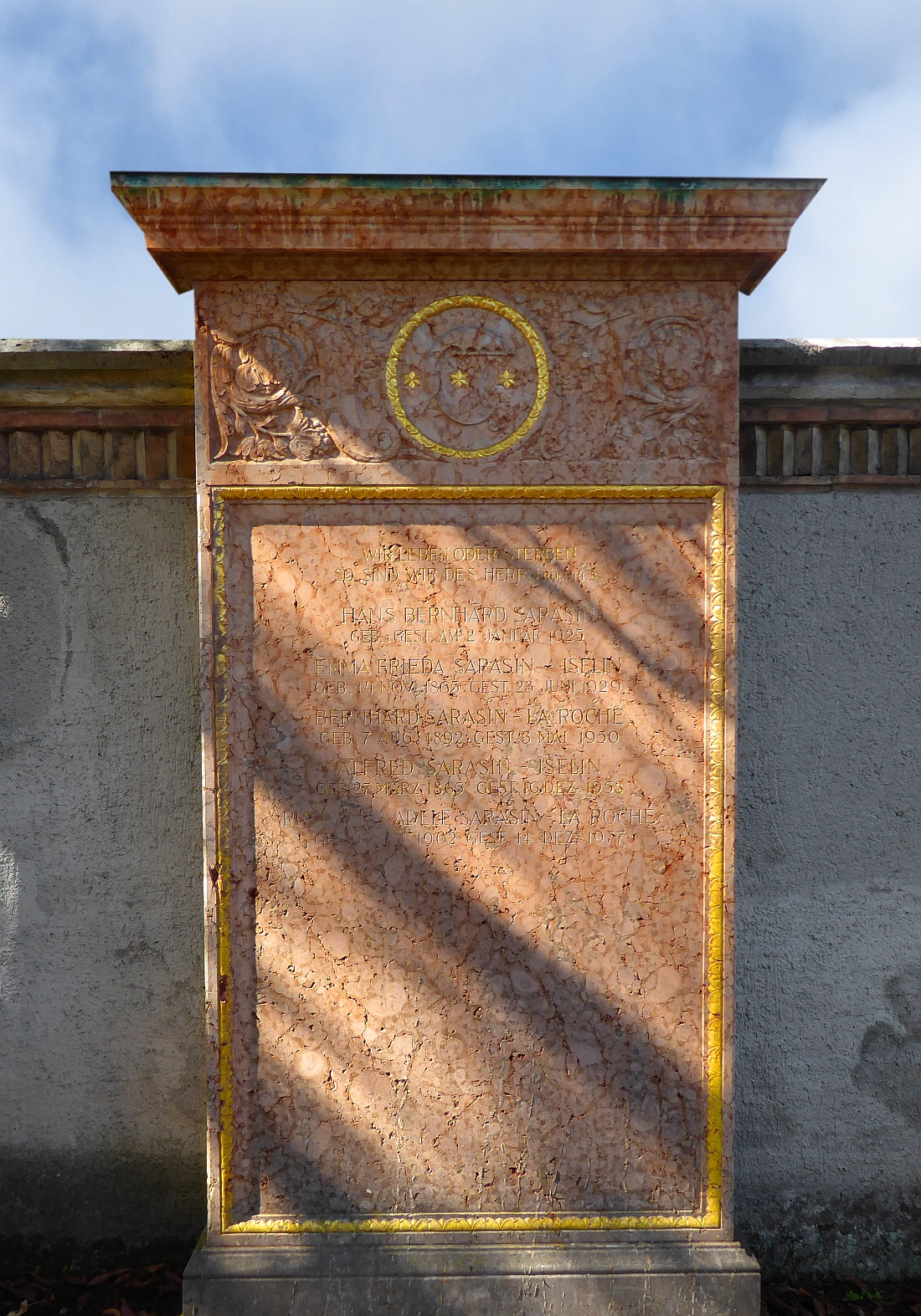 Alfred Sarasin-Iselin (1865–1953) Bankier, Mitbegründer der Sarasin & Cie, Politiker, Dr. h.c. der Univ. Basel, Grab auf dem Friedhof Wolfgottesacker, Basel